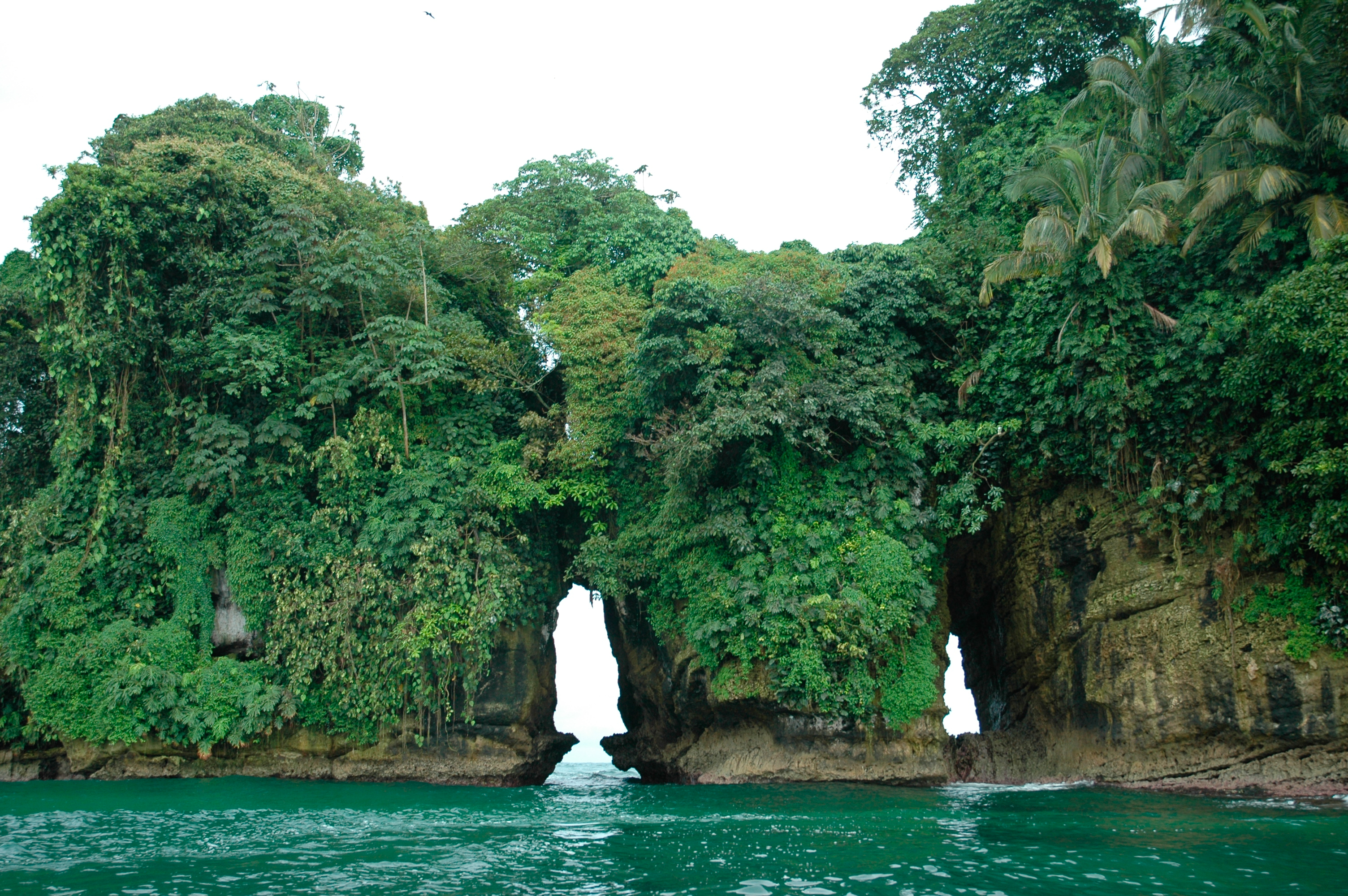 Isla en Bocas del Toro